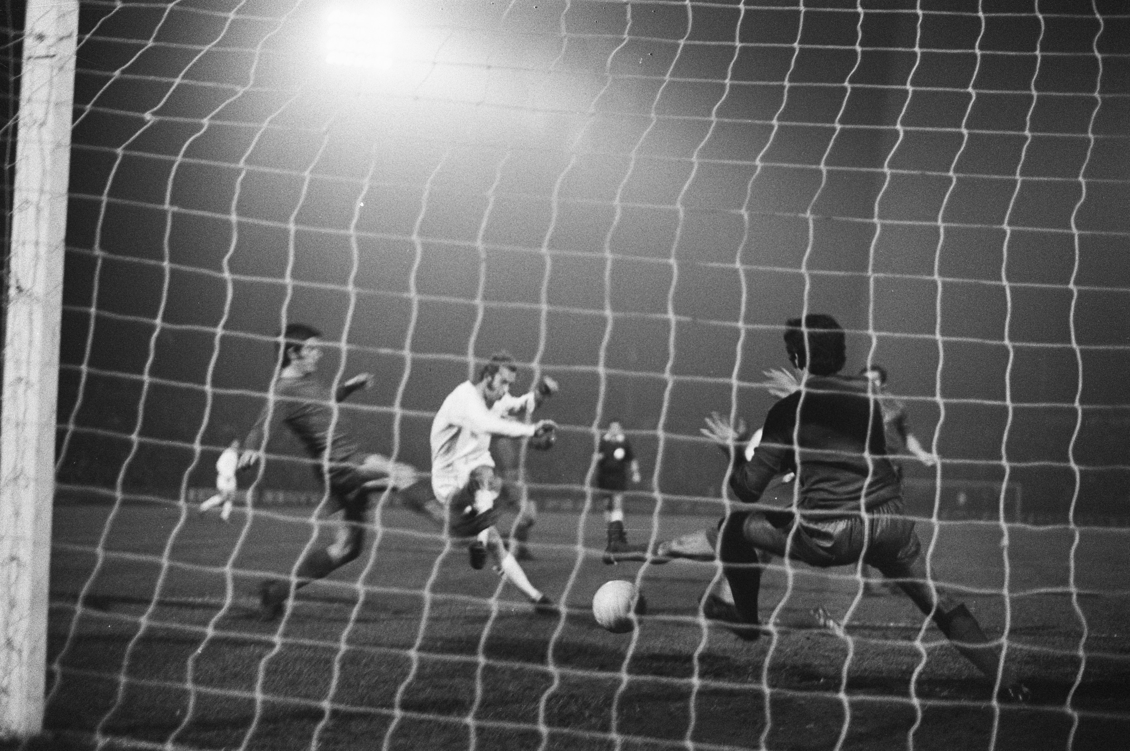 Collectie / Archief : Fotocollectie Anefo Reportage / Serie : [ onbekend ] Beschrijving : PSV tegen Real Madrid 2-0, doelpunt van Hoekema (2-0) Annotatie : Wedstrijd werd gespeeld in stadion De Vliert te Den Bosch Datum : 3 november 1971 Locatie : 's-Hertogenbosch Trefwoorden : doelpunten, sport, voetbal Persoonsnaam : Hoekema, Oekie Instellingsnaam : Real Madrid Fotograaf : Mieremet, Rob / Anefo, [onbekend] Auteursrechthebbende : Nationaal Archief Materiaalsoort : Negatief (zwart/wit) Nummer archiefinventaris : bekijk toegang 2.24.01.05 Bestanddeelnummer : 925-1043